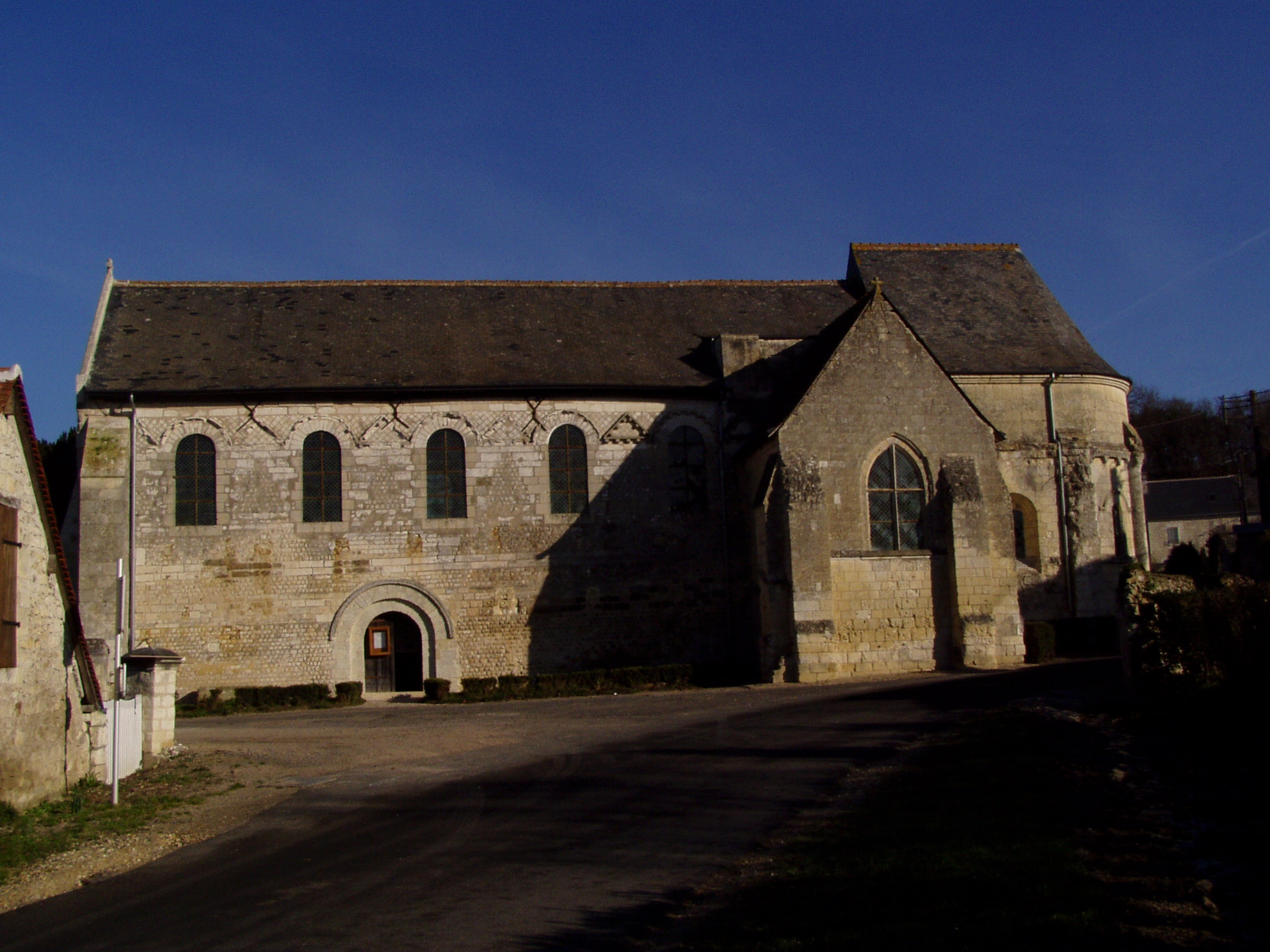 vue générale de l'église de Cravant-les-Côteaux en Indre-et-Loire (France)